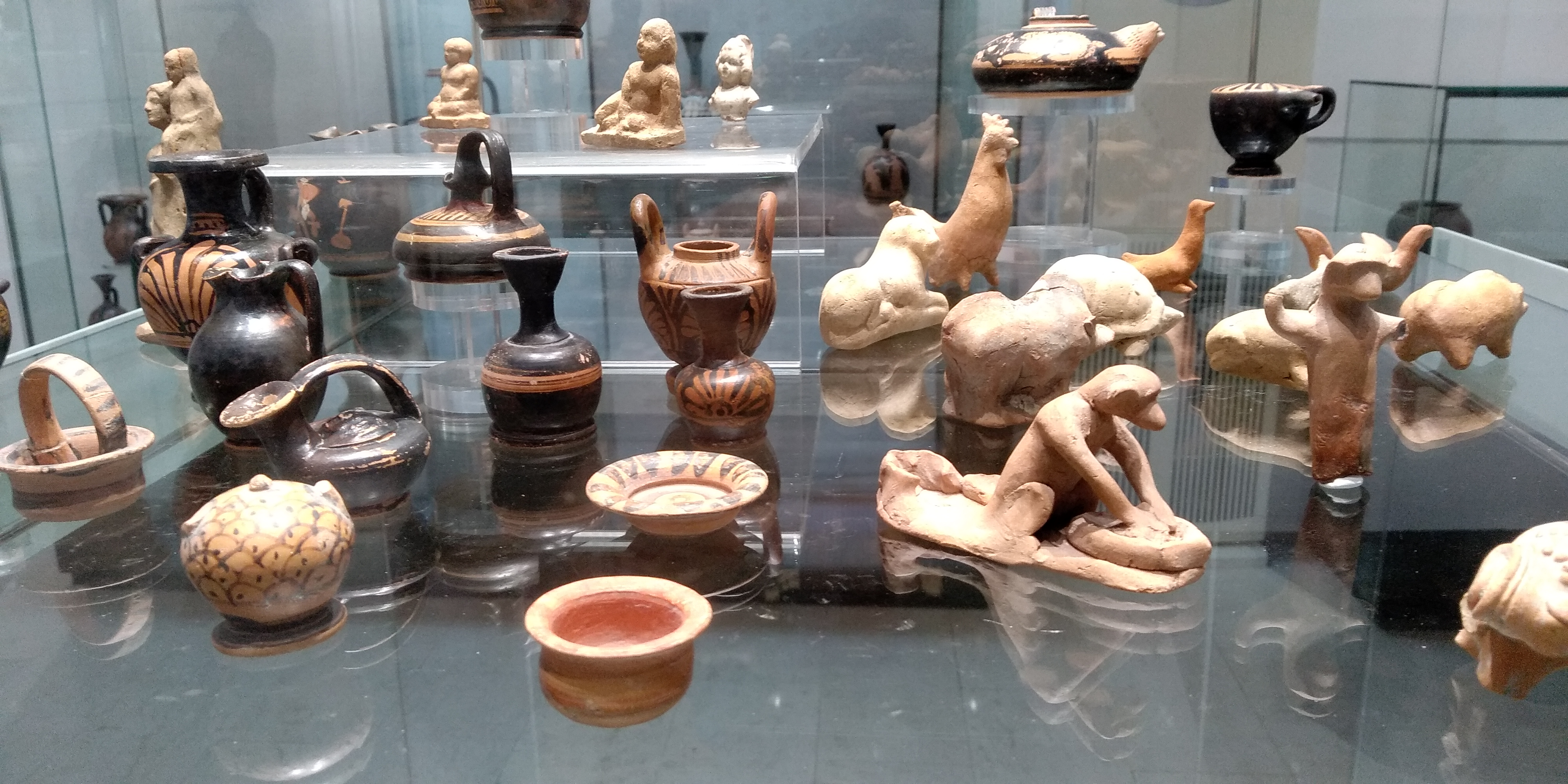 В Археологическия музей в Созопол